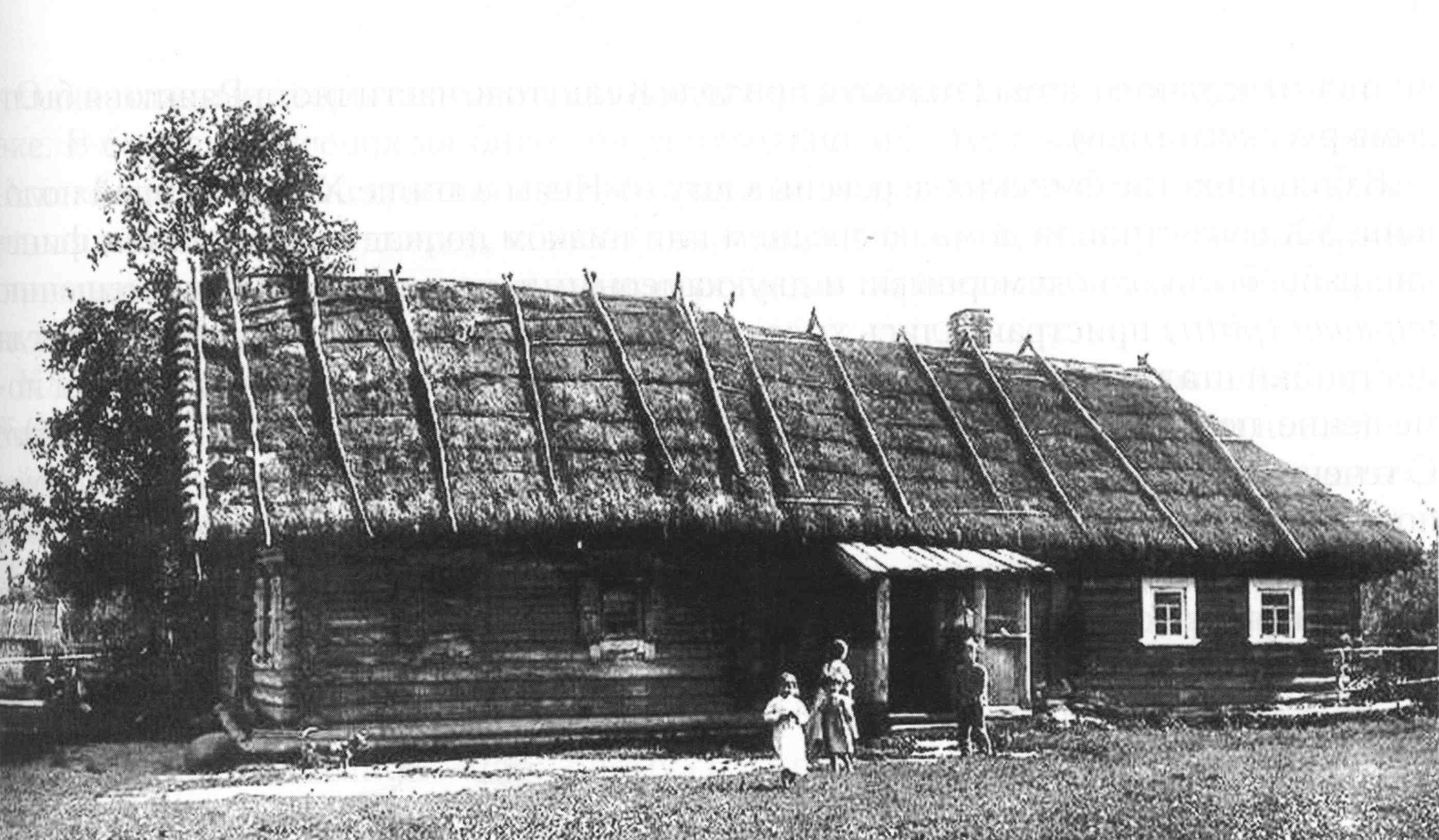 Дом в деревне Керстово.